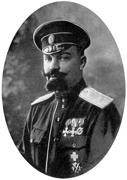 Военный деятель белого движения Кутепов Александр Павлович. Портрет